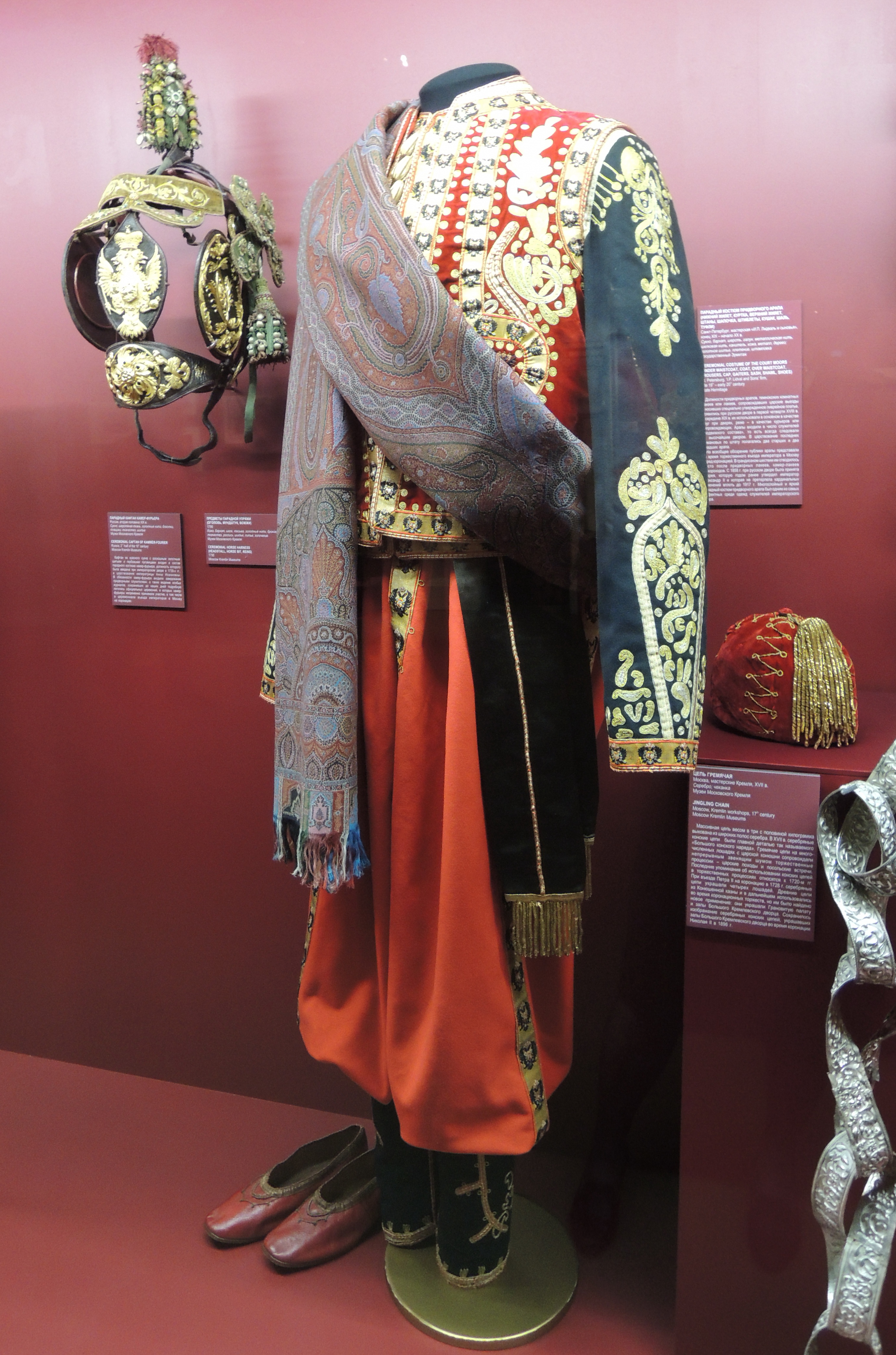 Парадный костюм придворного арапа (нижний жилет, куртка, верхний жилет, штаны, шапочка, штиблеты, кушак, шаль, туфли. СПб, мастерская "И.П. Лидваль и сыновья", к. 19 - нач. 20 в. Сукно, бархат, шерсть, галун, металлическая нить, шелковая нить, канитель, кожа, металл, дерево; золотное шитье, плетение, штамповка. Государственный Эрмитаж